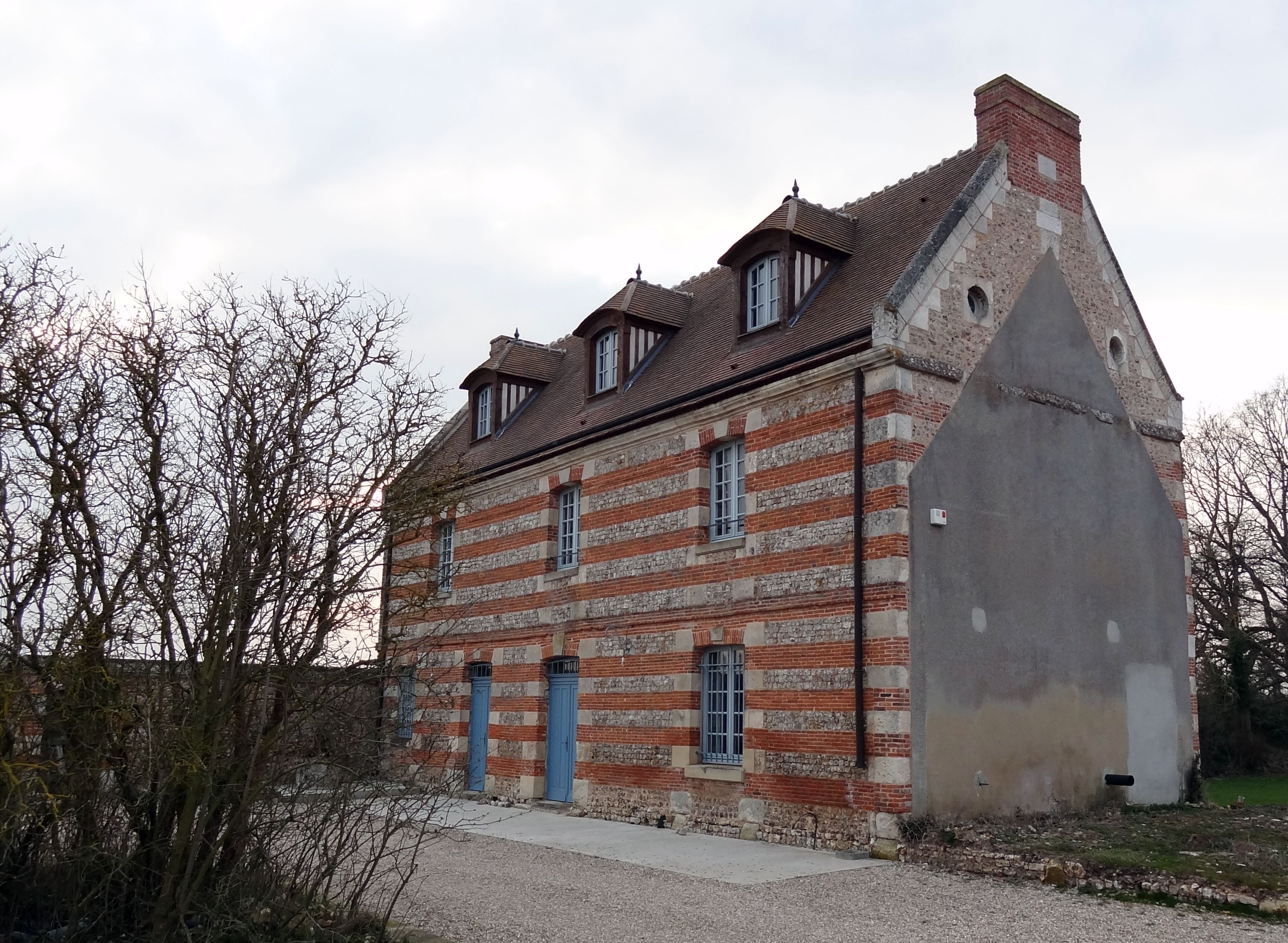 La Commanderie de Saint-Étienne-de-Renneville était une maison Templière prospère au Moyen-Âge. Elle est situé près d'Evreux en Normandie. On y voit la maison du régisseur.